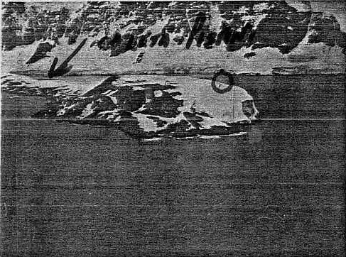 Isla Doumer con el Faro Patagonia (círculo).